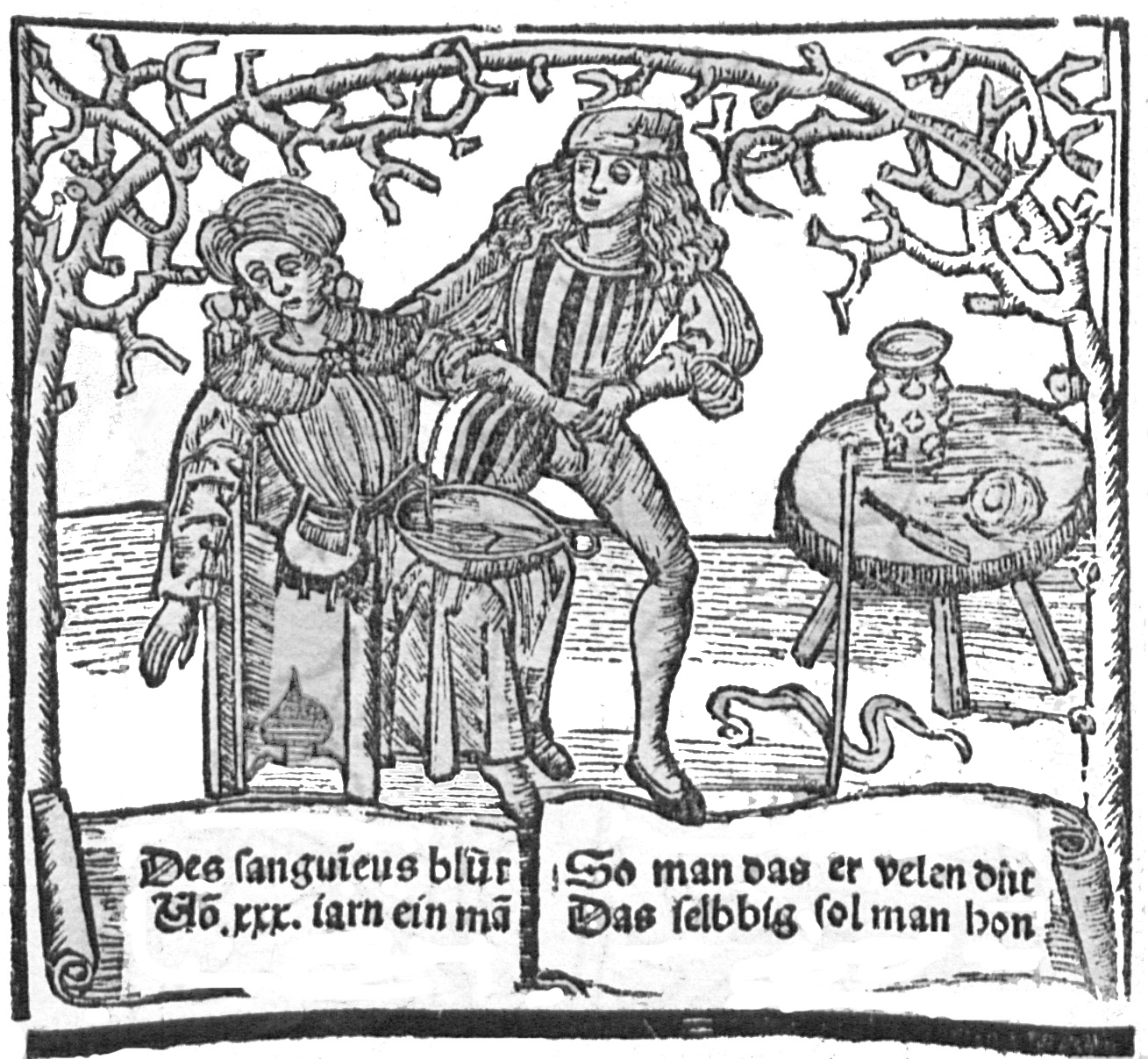 Aderlassscene